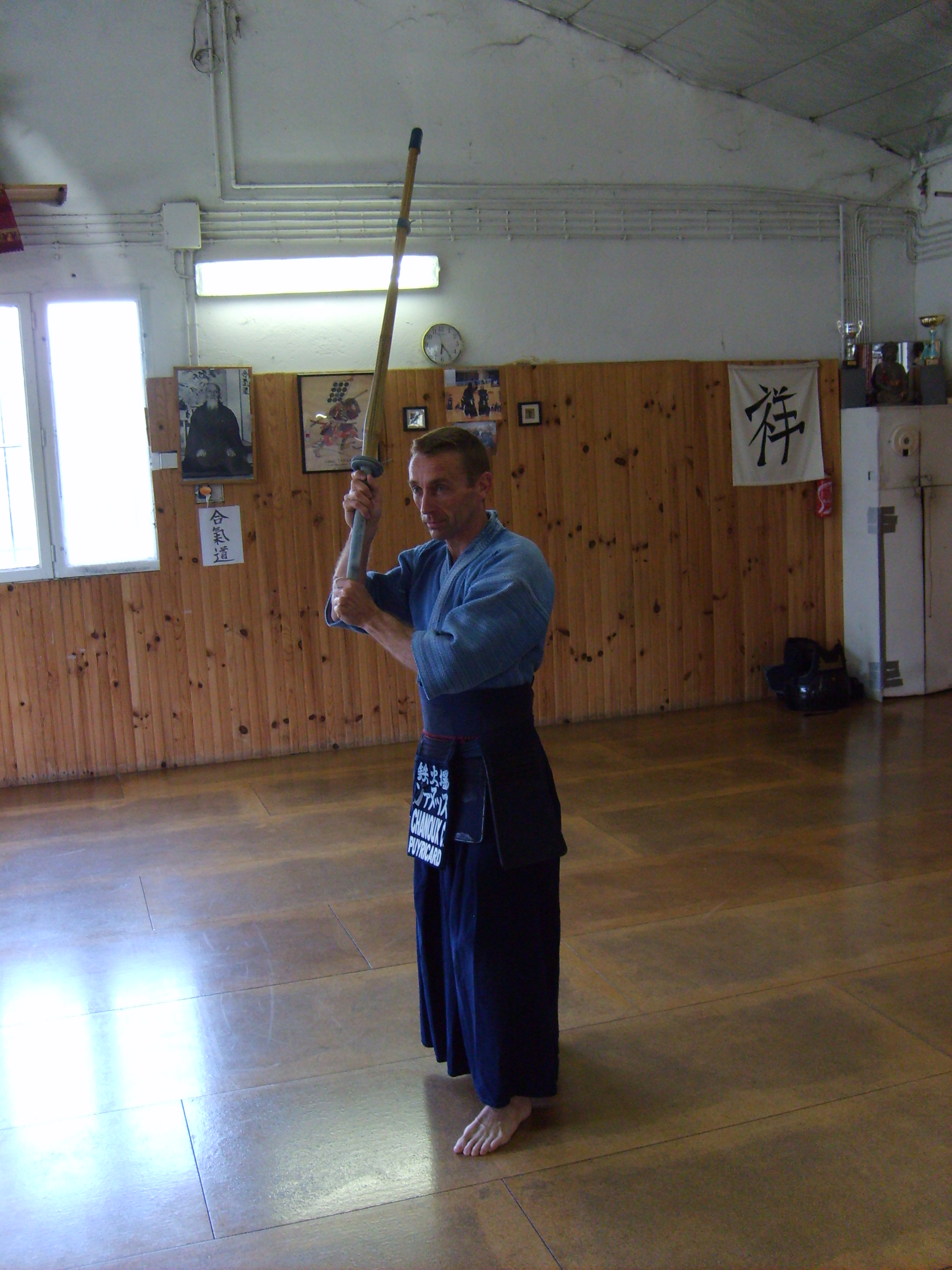 Christophe Chanoux du Dojo Tekkaba à Aix en Provence ( Garde Hasso